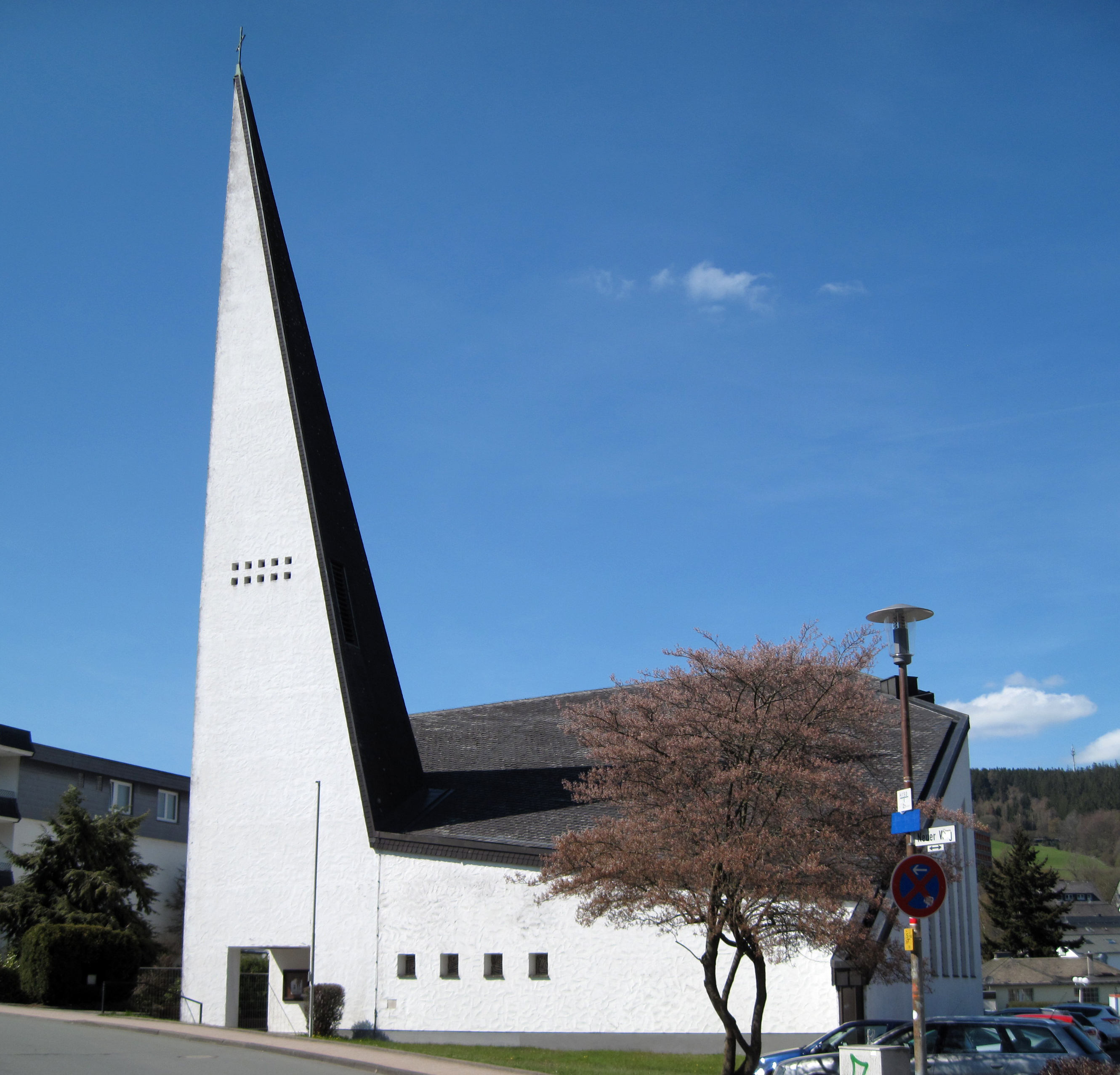 St. Augustinus, Willingen, Hessen, Deutschland